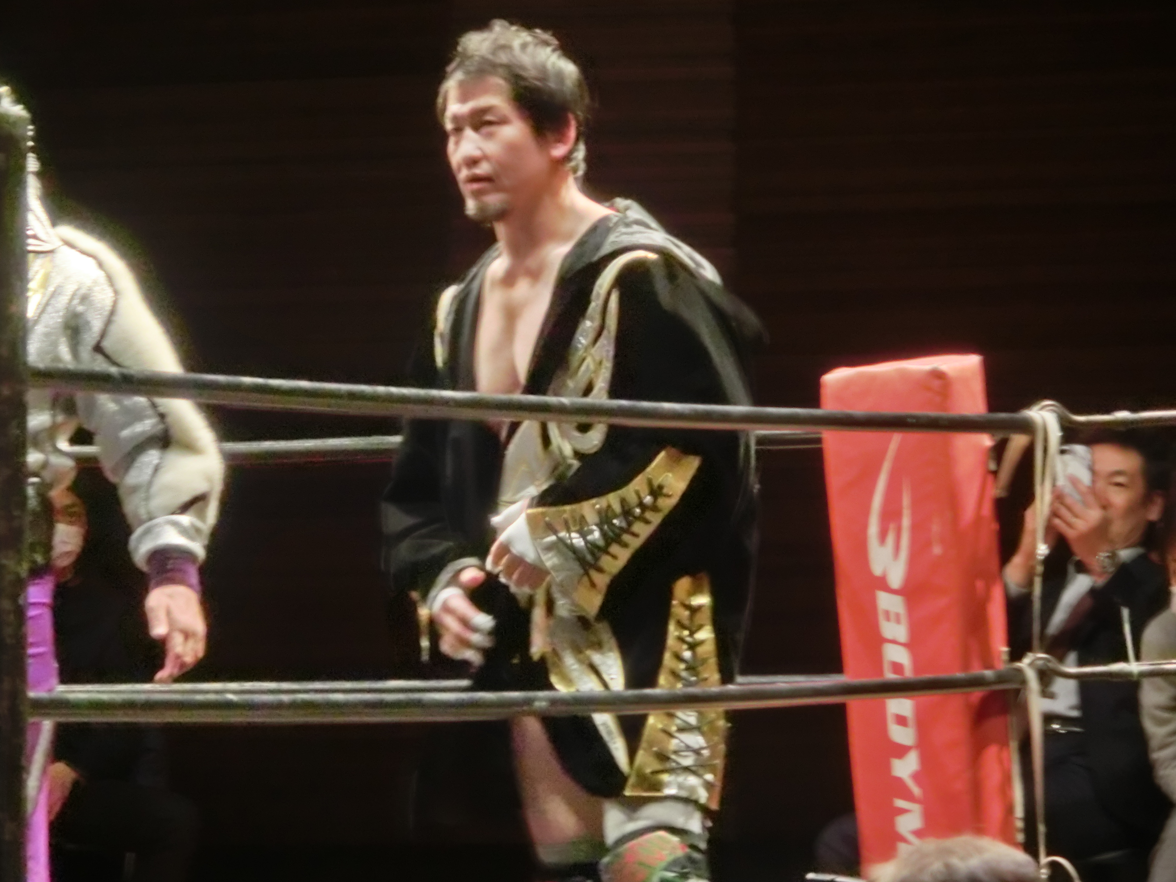 Masa Saito mourning performance